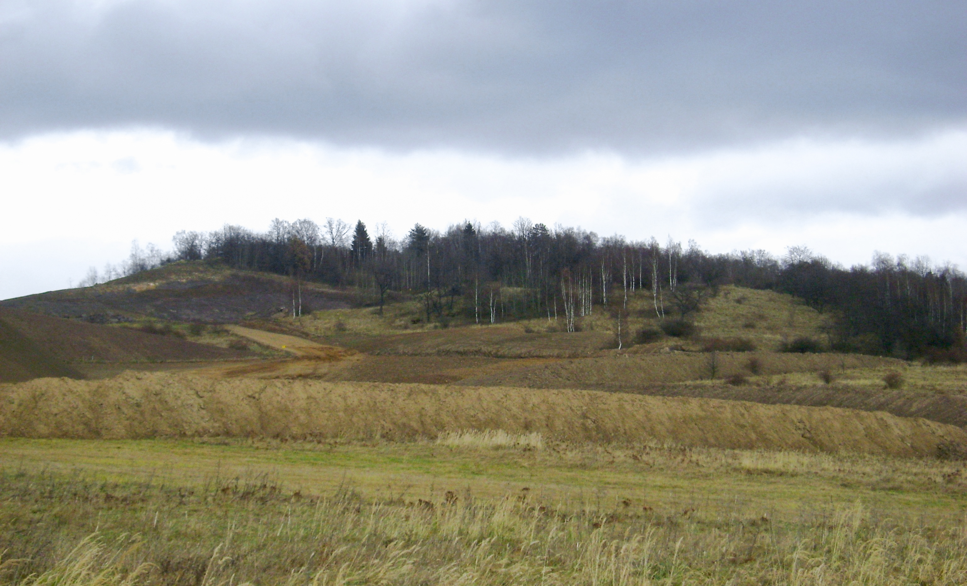 Gardzień -wzniesienie w południowo-zachodniej Polsce na Obniżeniu Ścinawki, w Sudetach Środkowych, woj dolnośląskie.